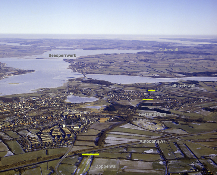 Luftbild, Blick über das Danewerk nach Osten